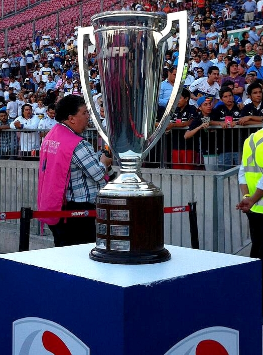 Trofeo que se le otorga al campeón de la competencia